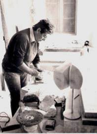 חוה מחותן 1978